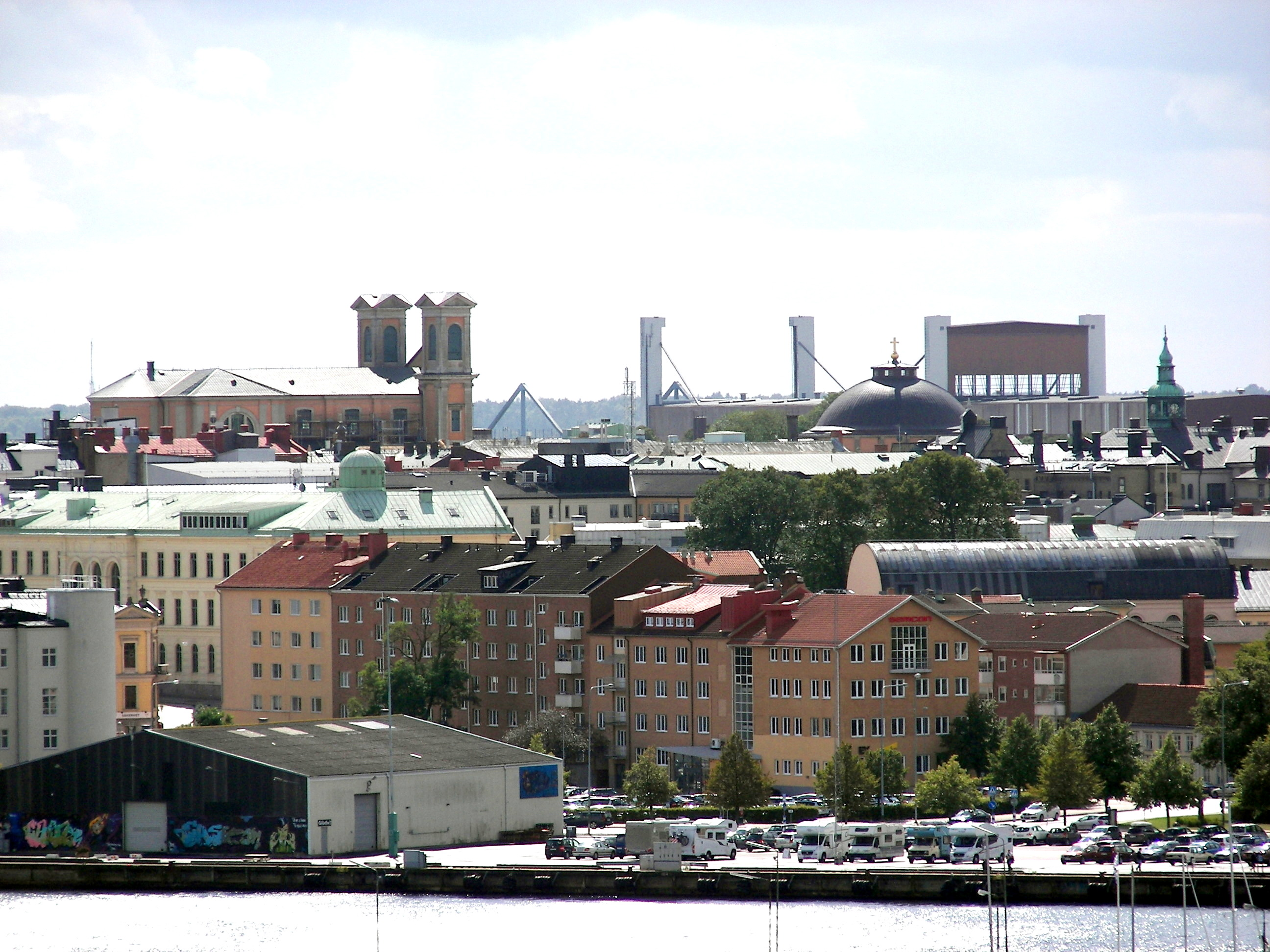 Centrala Trossö sett från Bryggareberget. I bilden syns Fredrikskyrkans och Trefaldighetskyrkan tak.